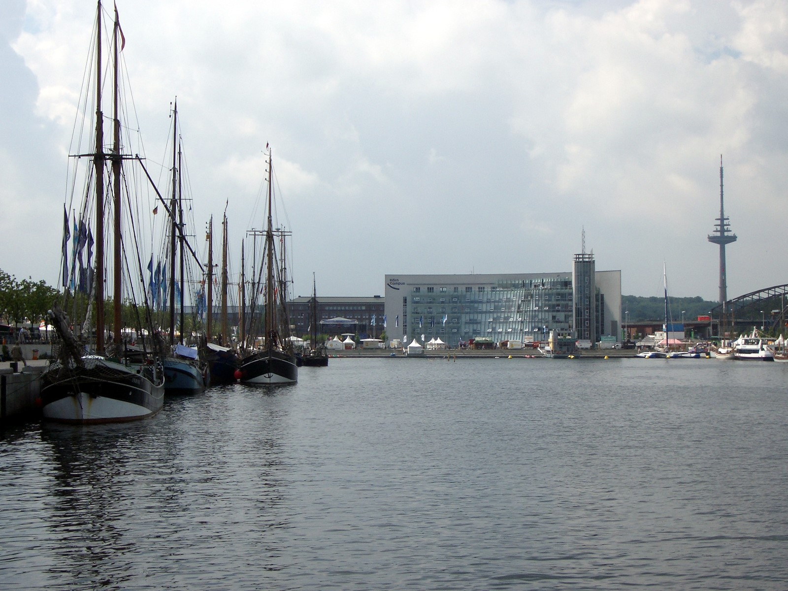 Blick von der Hörnbrücke auf die Hörnspitze in Kiel (Ende der Kieler Förde). Im Hintergrund: Der Hörn-Campus, der Fernmeldeturm und die Gablenzbrücke.